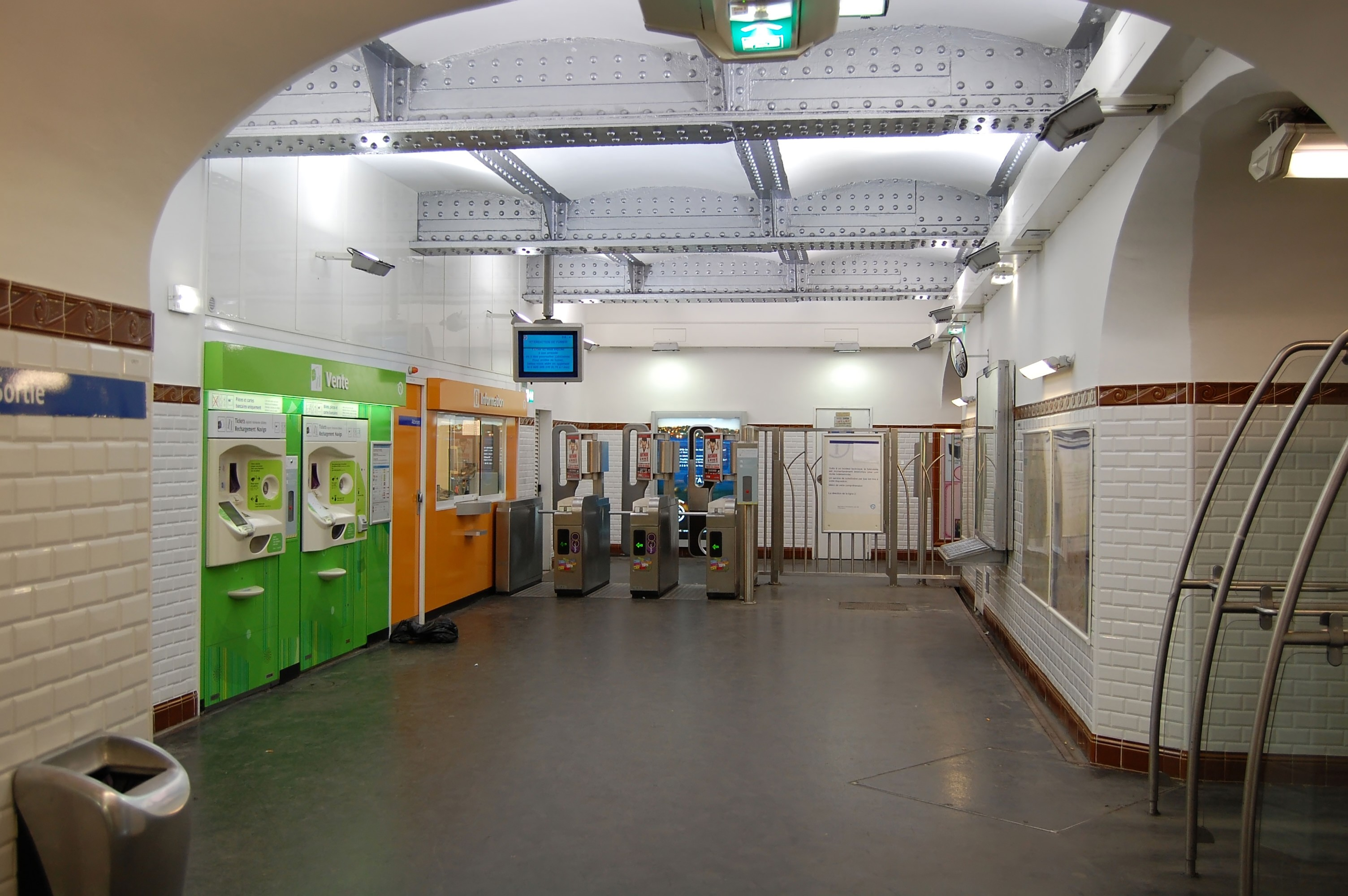 Entrée de la station Abesses du Métro de Paris(ligne 12), Paris, France. C'est une des rares stations en grande profondeur du métro de Paris.